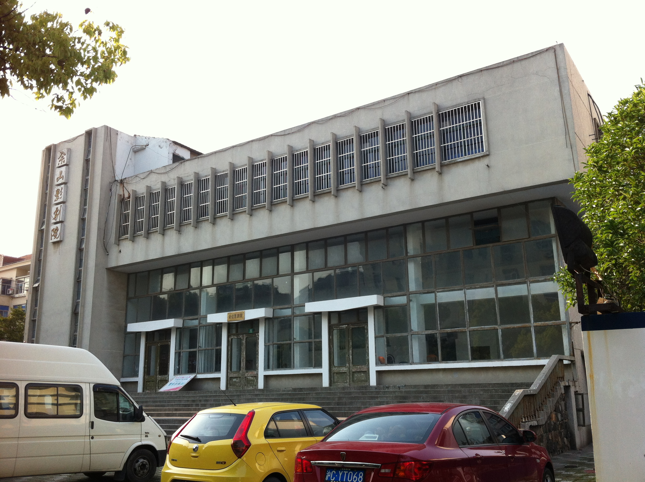 位於中國上海市松江區佘山鎮陳坊橋的佘山影劇院